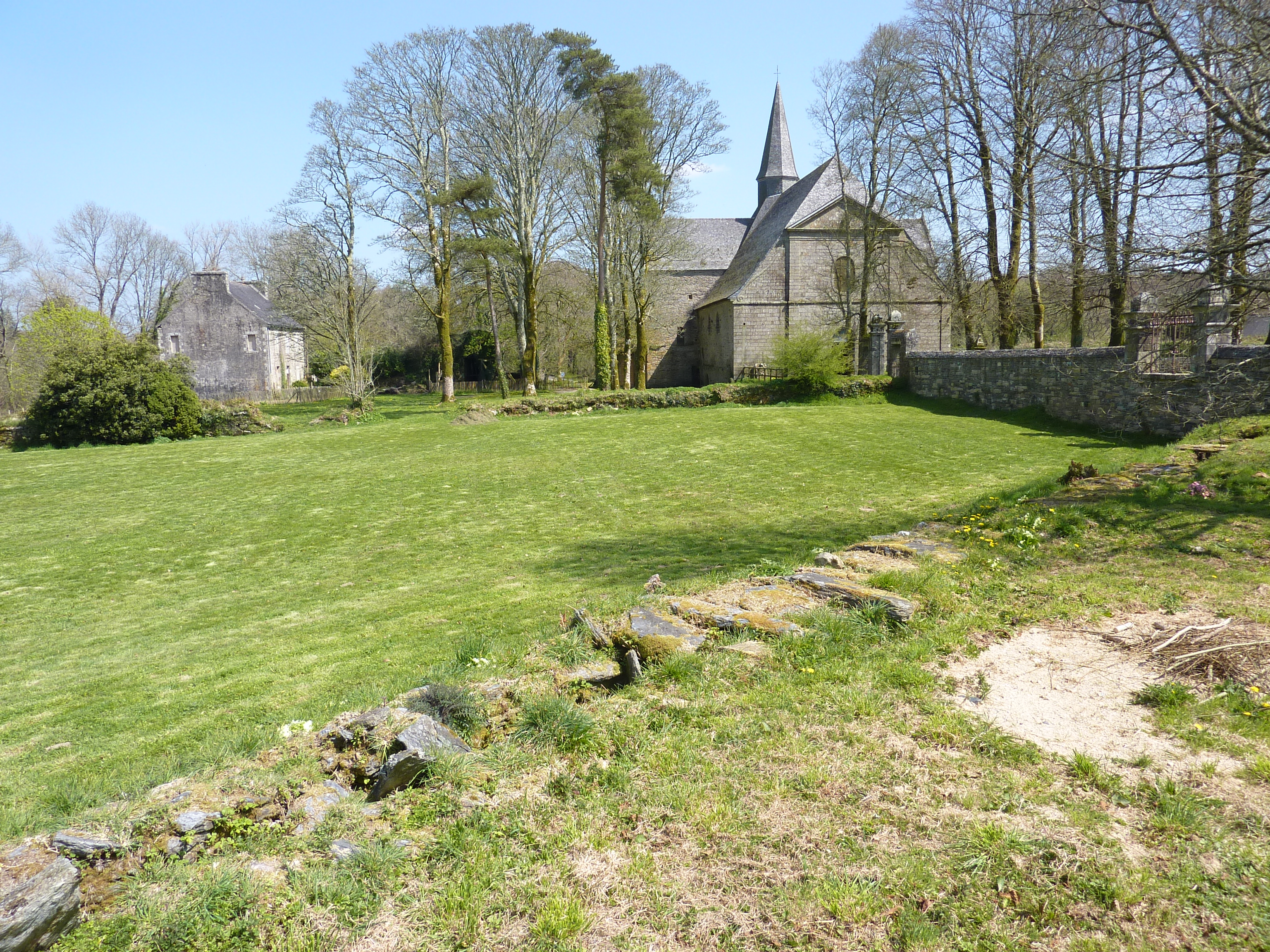 L'hydraulique à l'abbaye du Relec; ancienne canalisation